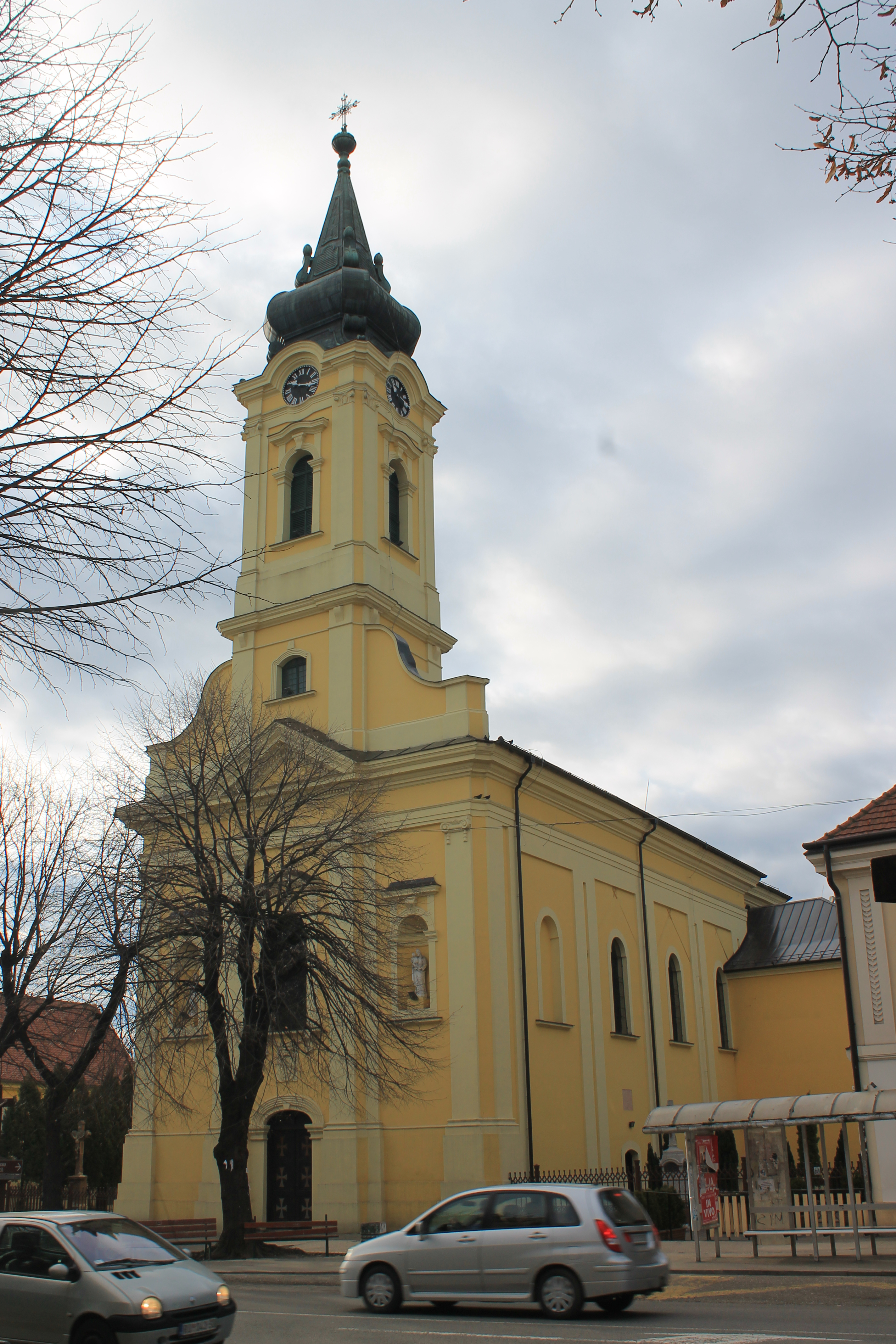 Rimokatolička crkva Uzdizanja Časnog krsta u Rumi